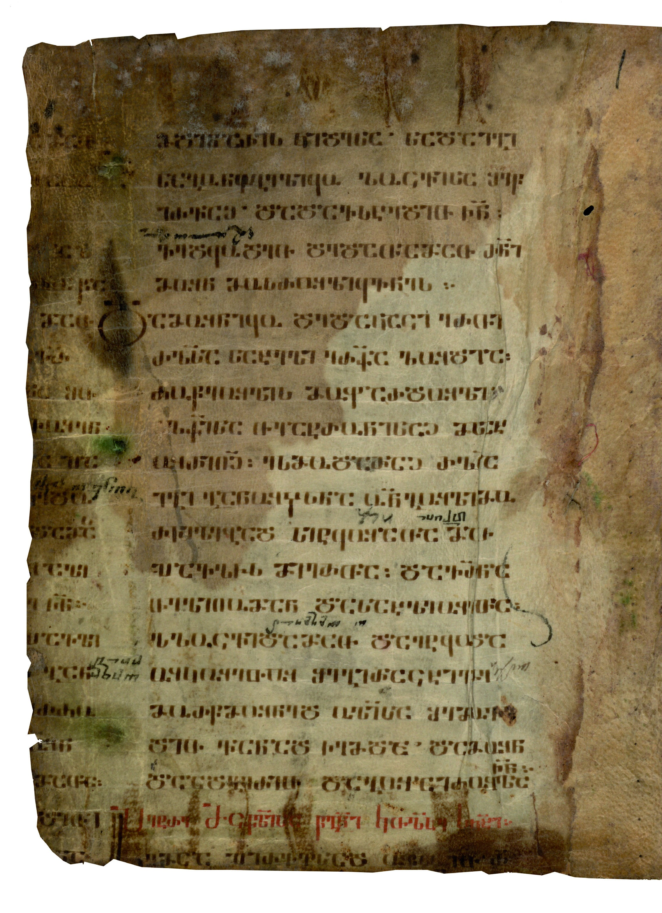 ლექციონარი, X საუკუნე, 1446/350